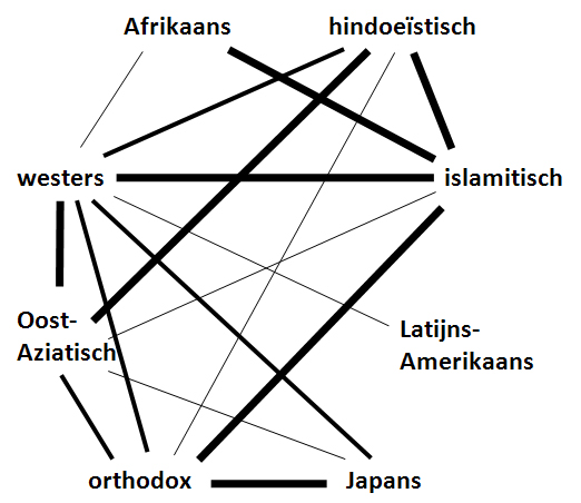 Opkomende beschavingen zoals voorspeld door Huntington in 1996. Hoe dikker de lijn wordt, hoe groter de kans op conflicten.